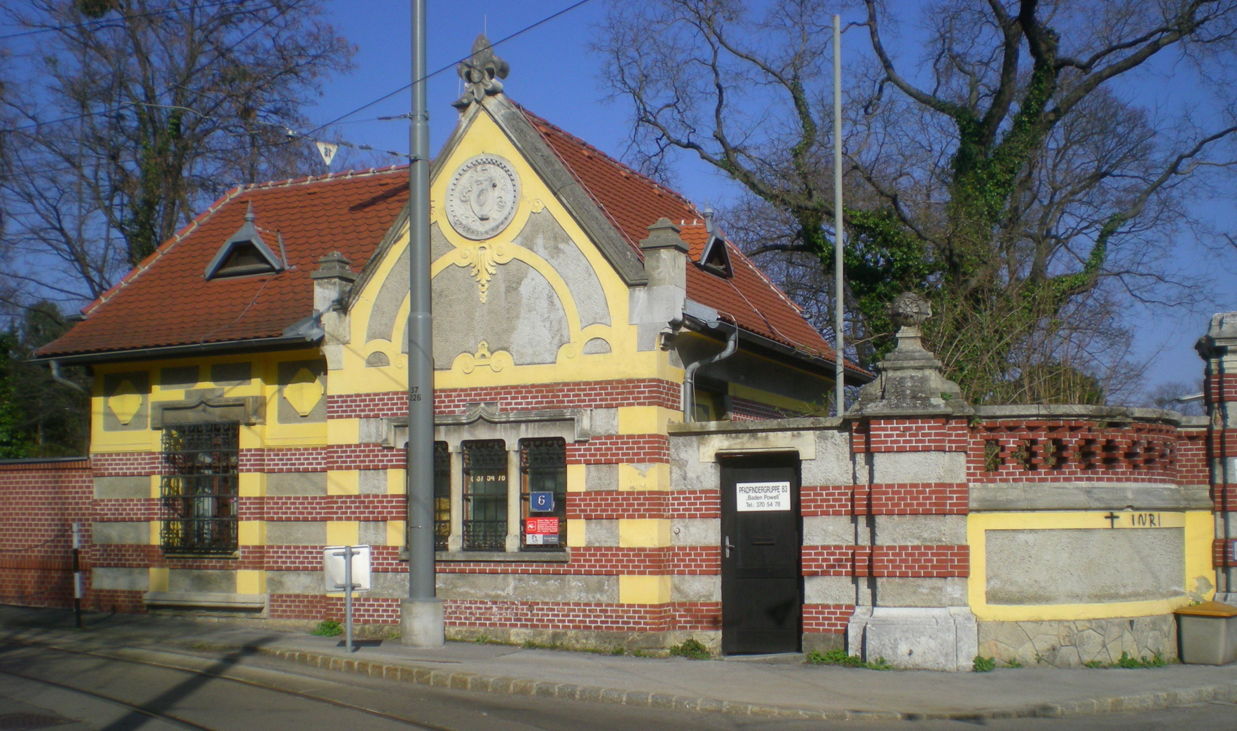 ehemaliges Pförtnerhaus der Rothschild-Gärten in Wien-Döbling